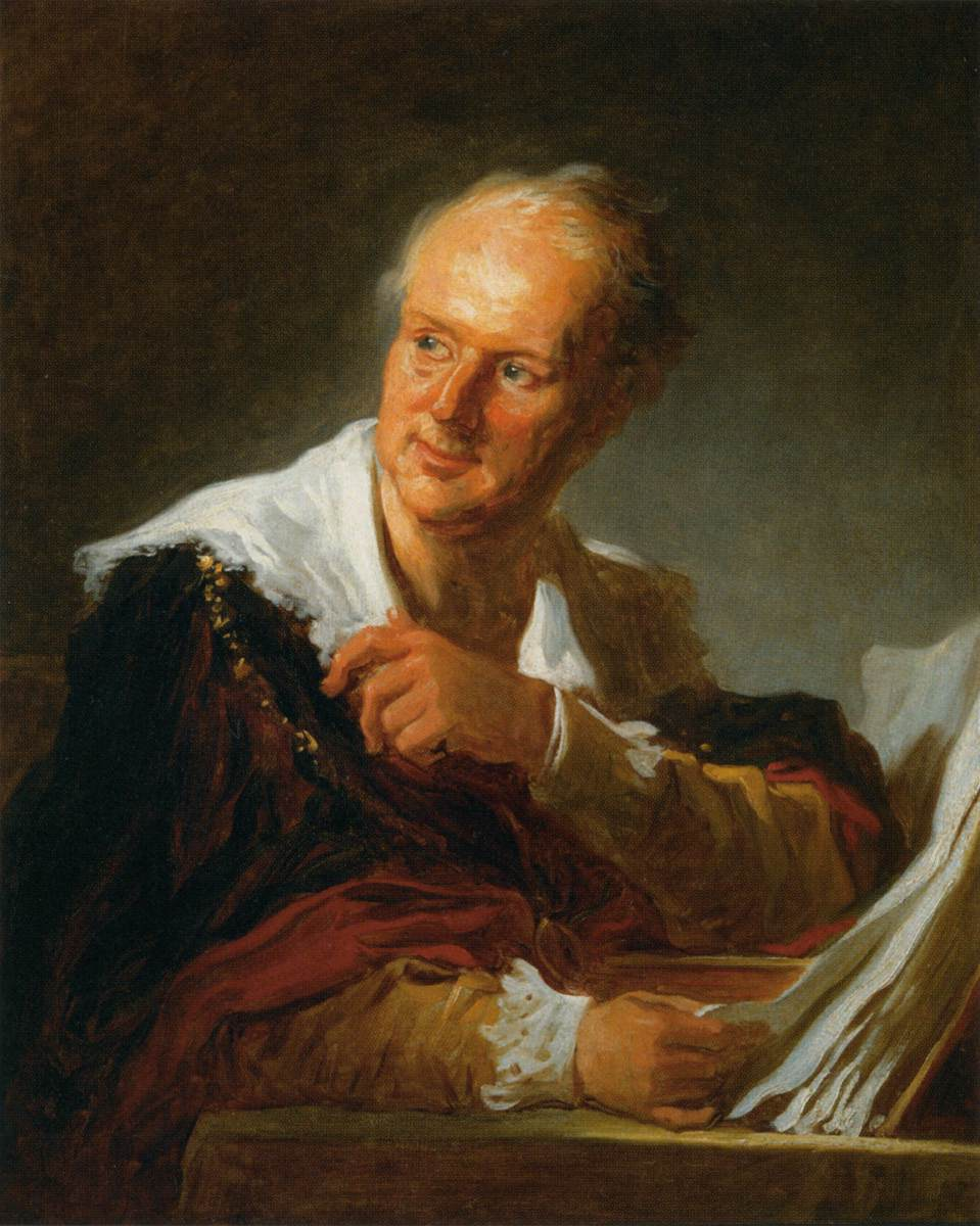 Portrait d'homme, nommé « Meunier », autrefois identifiée à tort comme Denis Diderot